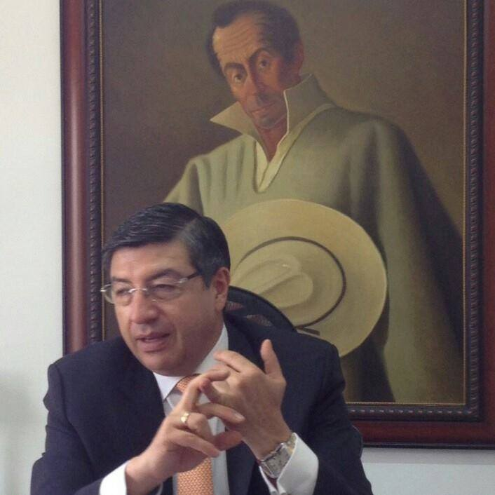 Senador de la República de Colombia.